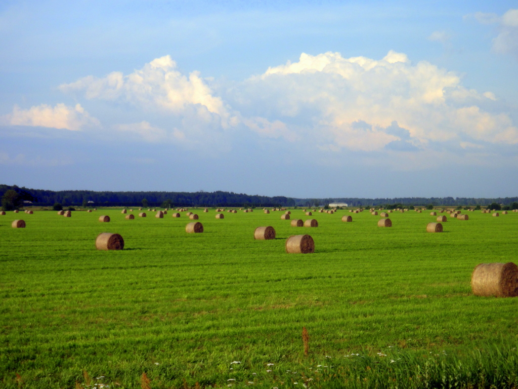 Field